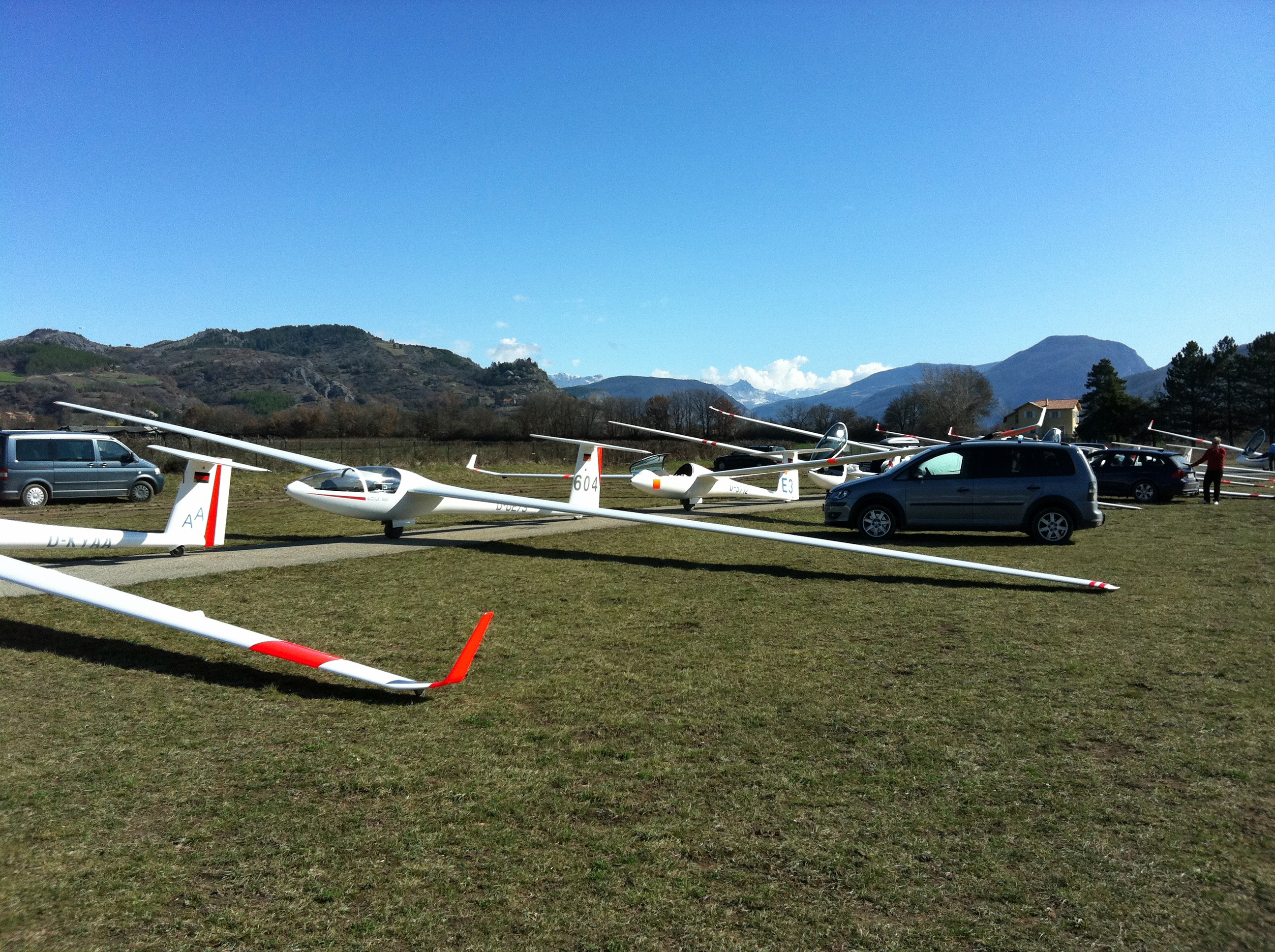 Glasflügel 604 vor dem Start in Gap, Südfrankreich